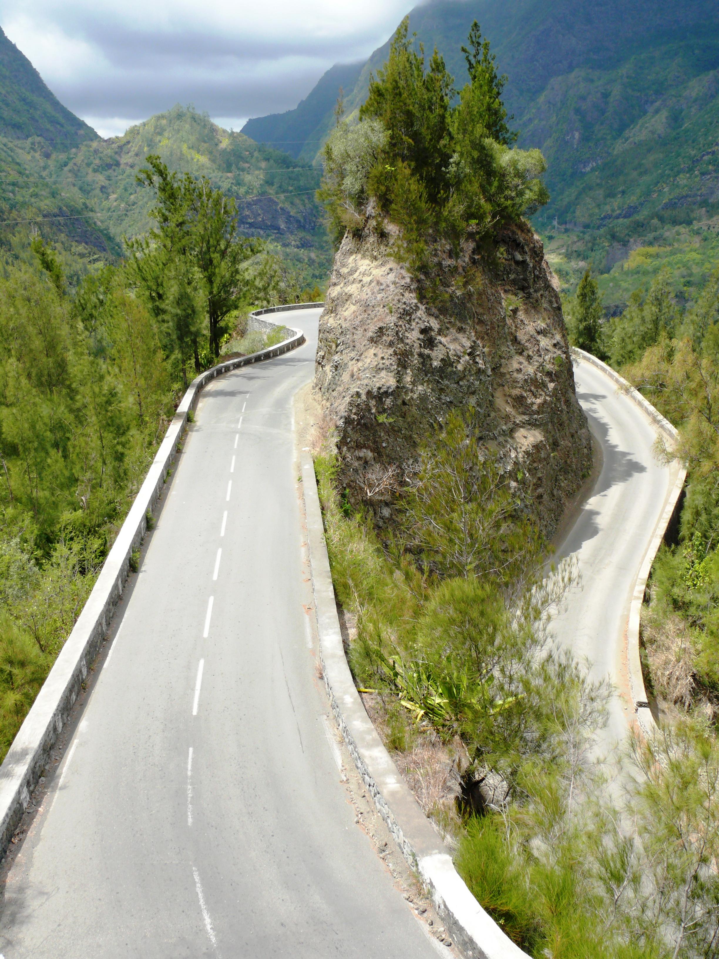 La Réunion - Route nationale 5 - La route entre Le Pavillon et le Palmiste Rouge fait de nombreuses boucles pour monter